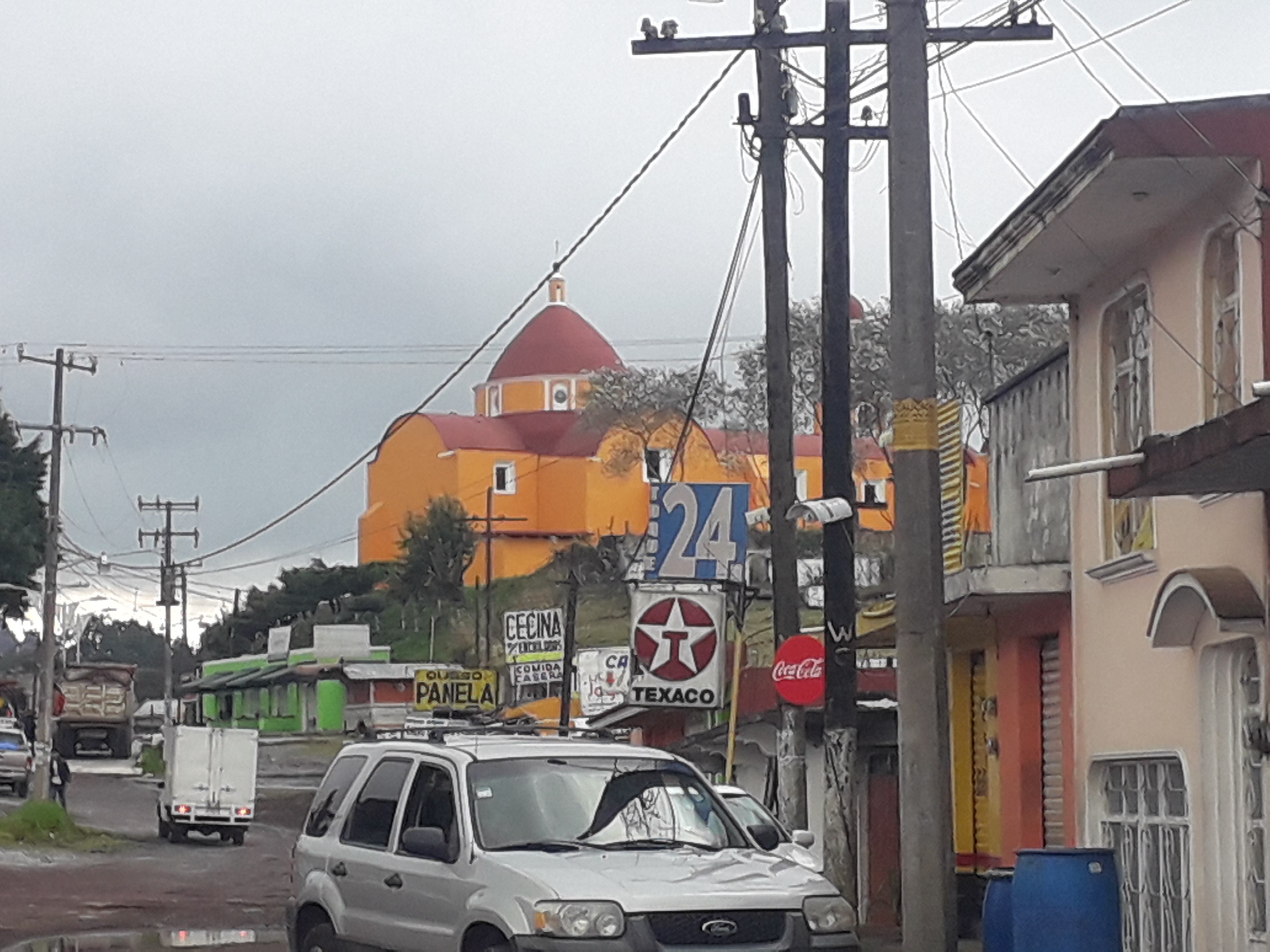 Foto tomada desde la carretera